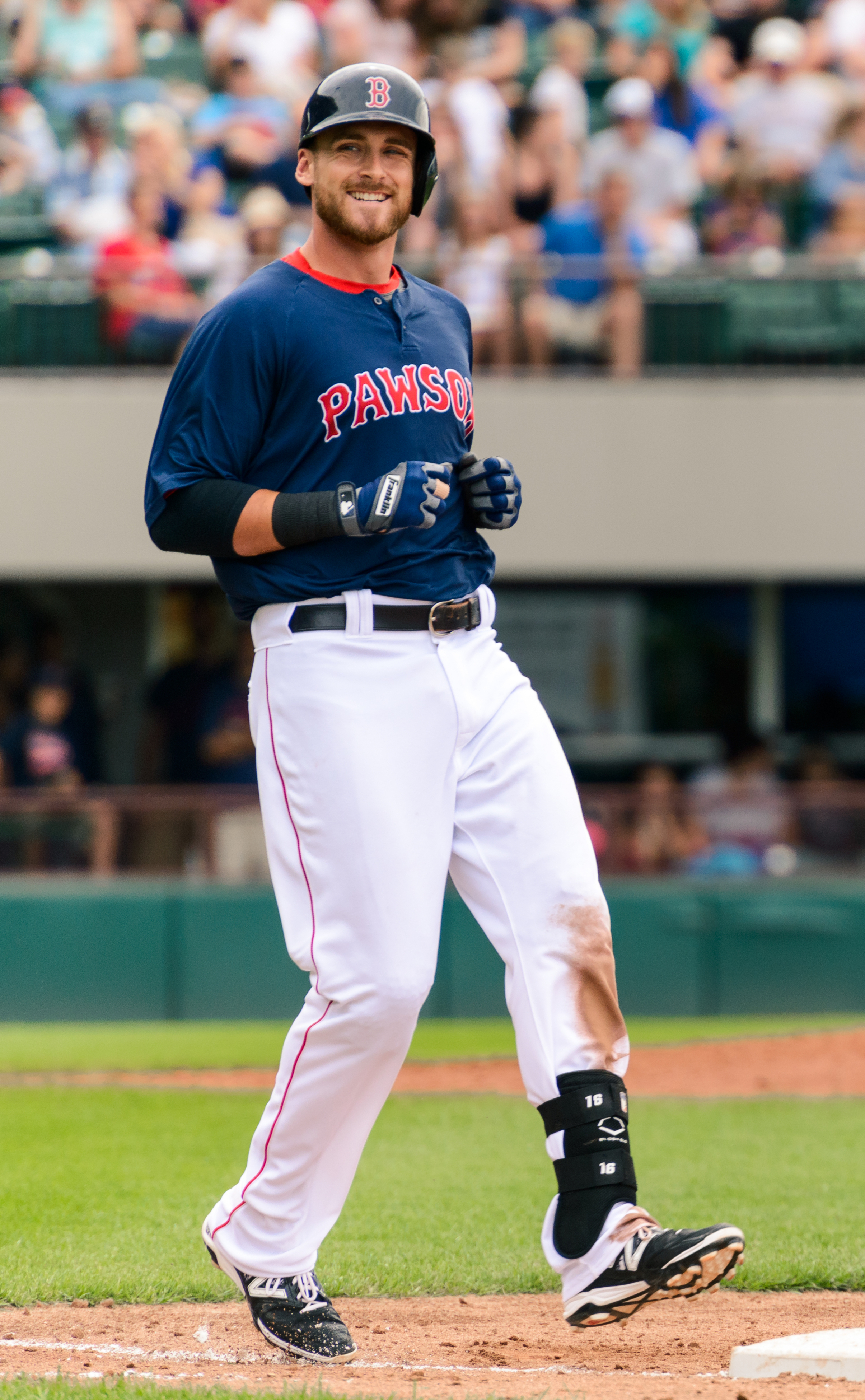 Will Middlebrooks